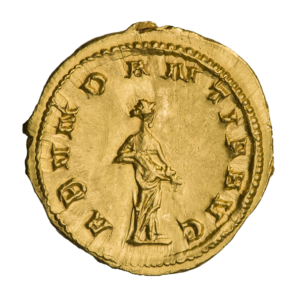 Ауреус. Траян Деций. Ок. 249—251 гг. (реверс). Надпись ABVNDANTIA AVG. Абунданция (персонификация изобилия) стоит, вправо; высыпает монеты из рога изобилия.